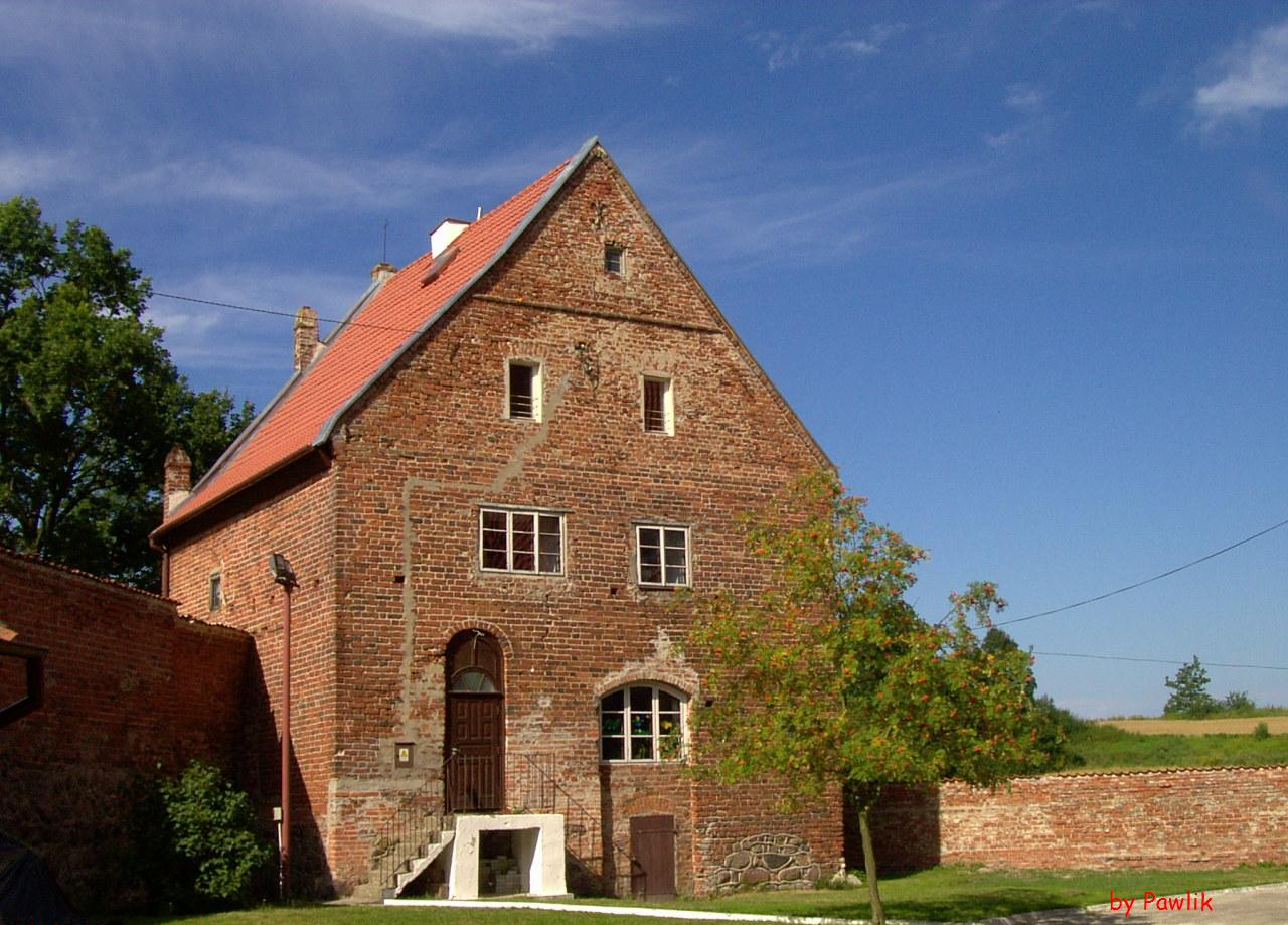 Sępopol - baszta obronna